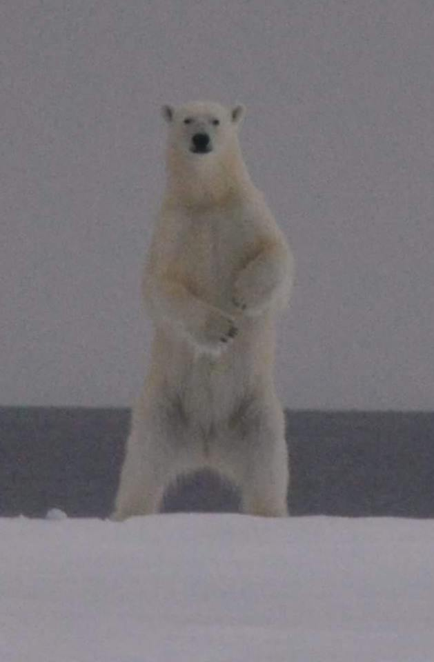 Eisbär bei Qikiqtarjuaq, Baffininsel, Nunavut